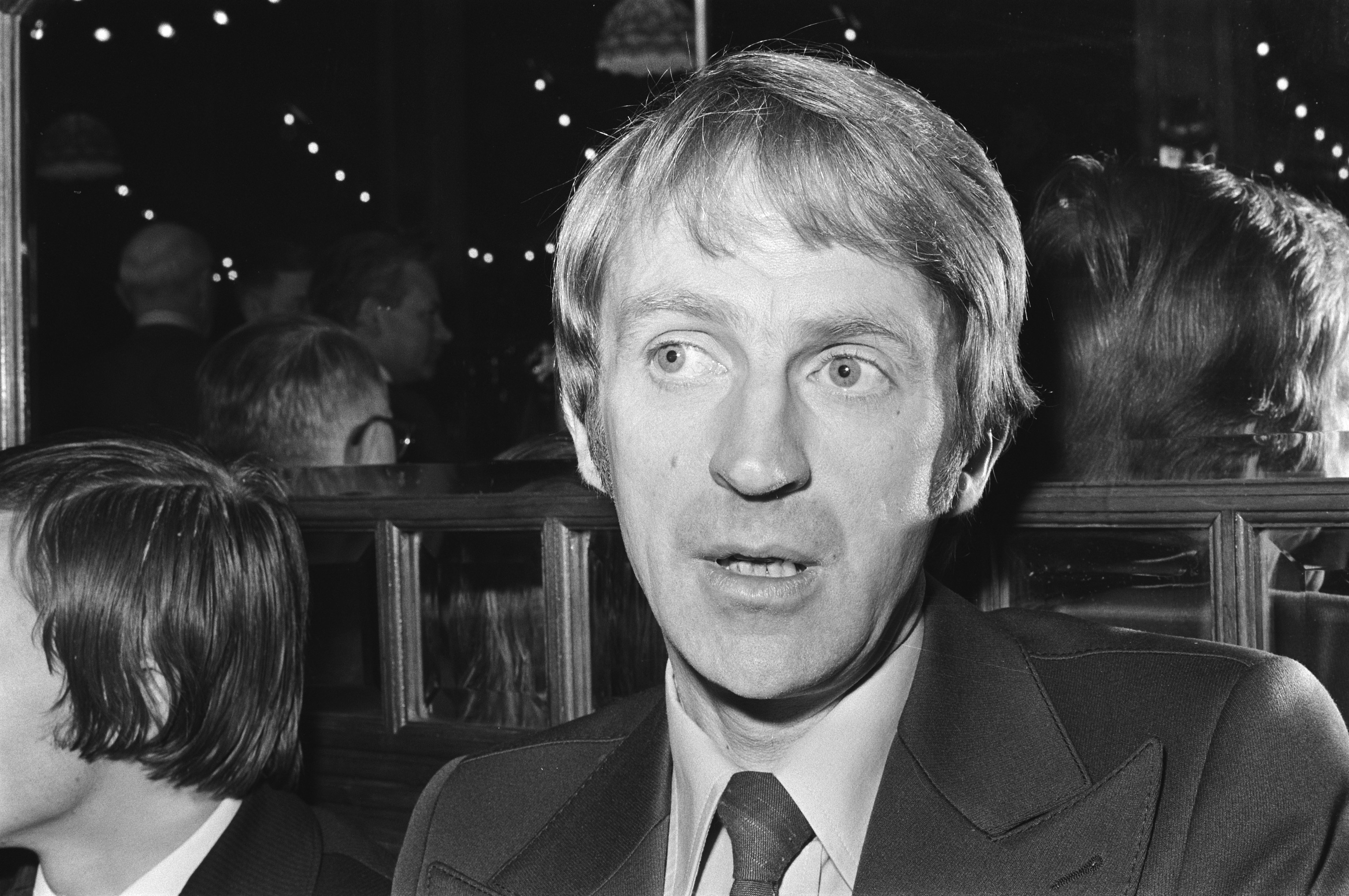 Collectie / Archief : Fotocollectie Anefo Reportage / Serie : [ onbekend ] Beschrijving : Loting Euwe vierkampschaken, 23, Olafsson kop, Datum : 13 mei 1976 Trefwoorden : schaken Persoonsnaam : Karpov, Anatoli, Olafsson, Fridrik Fotograaf : Peters, Hans / Anefo Auteursrechthebbende : Nationaal Archief Materiaalsoort : Negatief (zwart/wit) Nummer archiefinventaris : bekijk toegang 2.24.01.05 Bestanddeelnummer : 928-5759